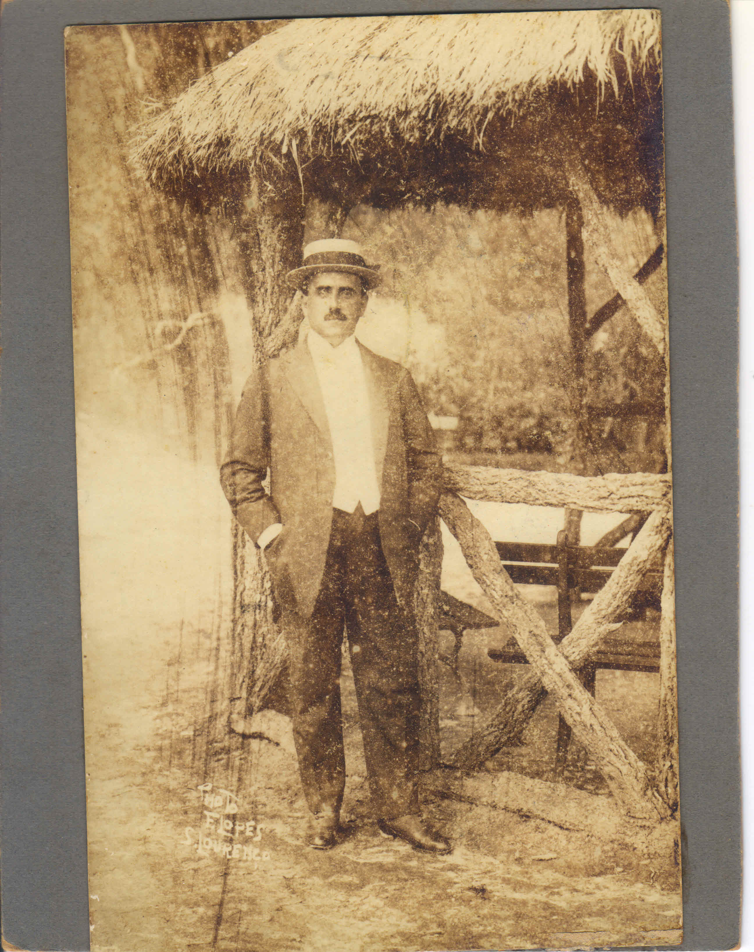 Octacílio de Carvalho Camará (Pelotas, RS, 1880 - Rio de Janeiro, RJ, 1920), médico, advogado, deputado federal e senador brasileiro.